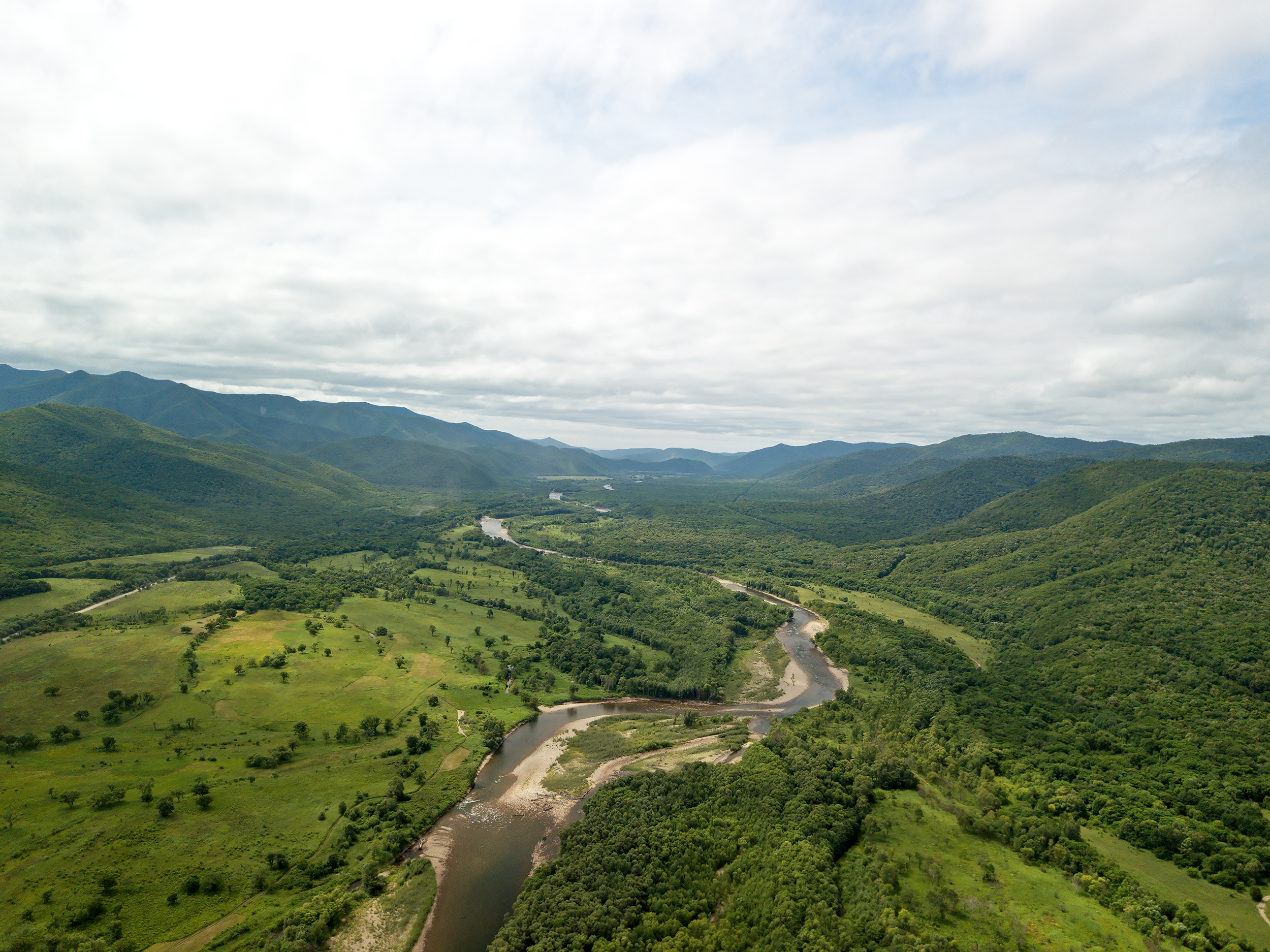 Долина реки Киевка